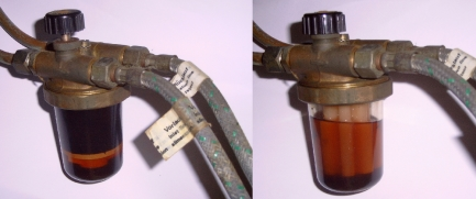 Ölfilter an einer Ölheizung